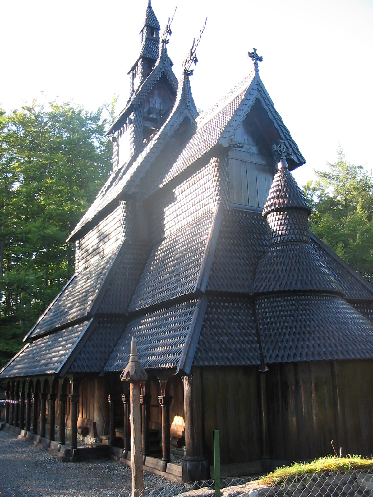 Stavkirke de Fantoft La Stavkirke de Fantoft est une église de la vallée de Bergen située à Fantoft. Le mot stavkirke vient du norvégien "stav" pour pieu et "kirke" pour église. Les stavkirker sont entièrement construites en bois, elles ont d'ailleurs pour traduction française « églises en bois debout ».